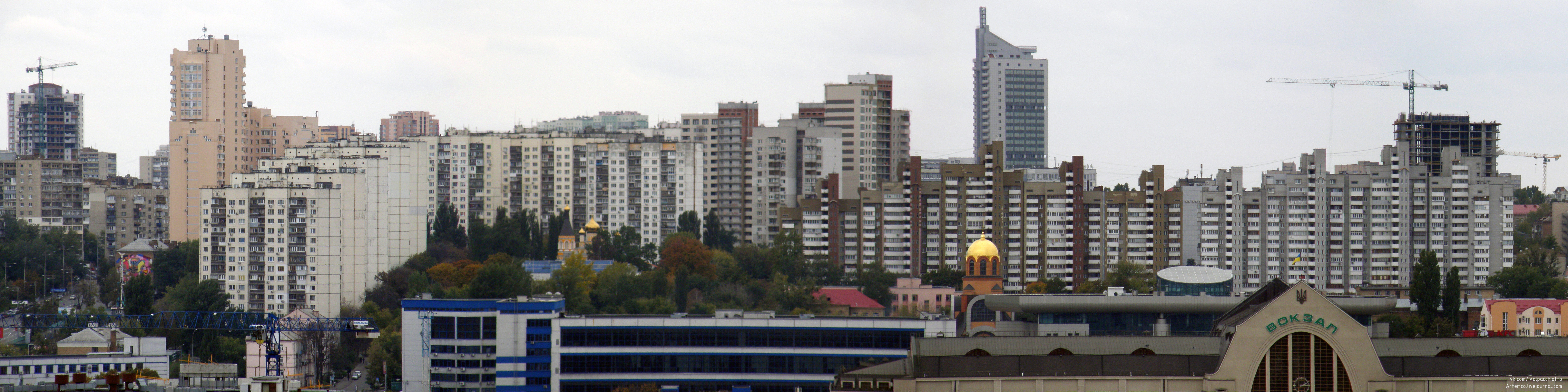 Соломенка с северо-востока